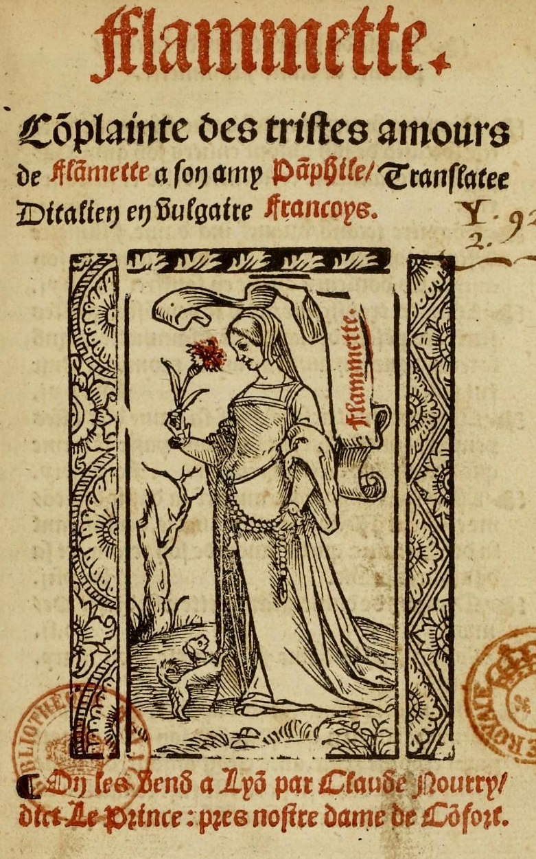 Frontispice de Flamette de Boccace, dans l'édition lyonnaise de 1532 par Claude Noury.